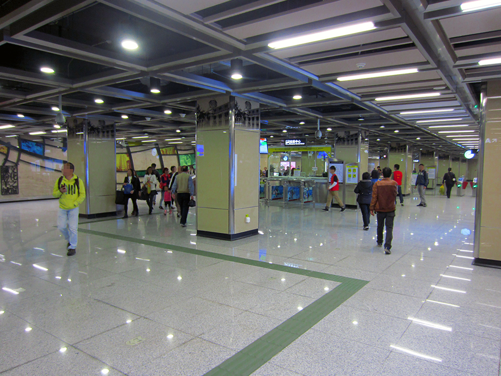 文化公園站站廳（6號線）